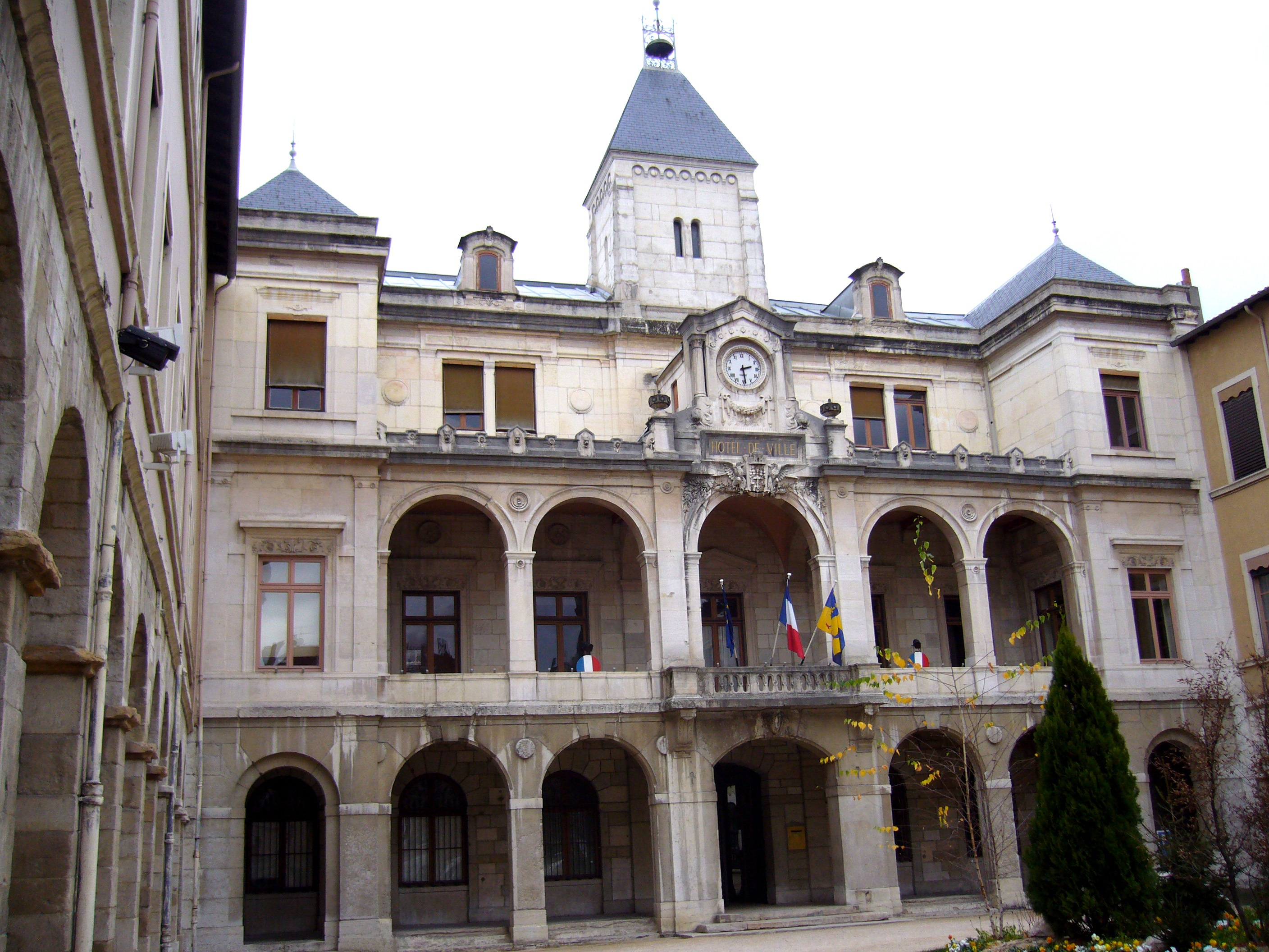 Hôtel de Ville de Vienne (Isère, France) - Vienne's city hall (Isère, France)